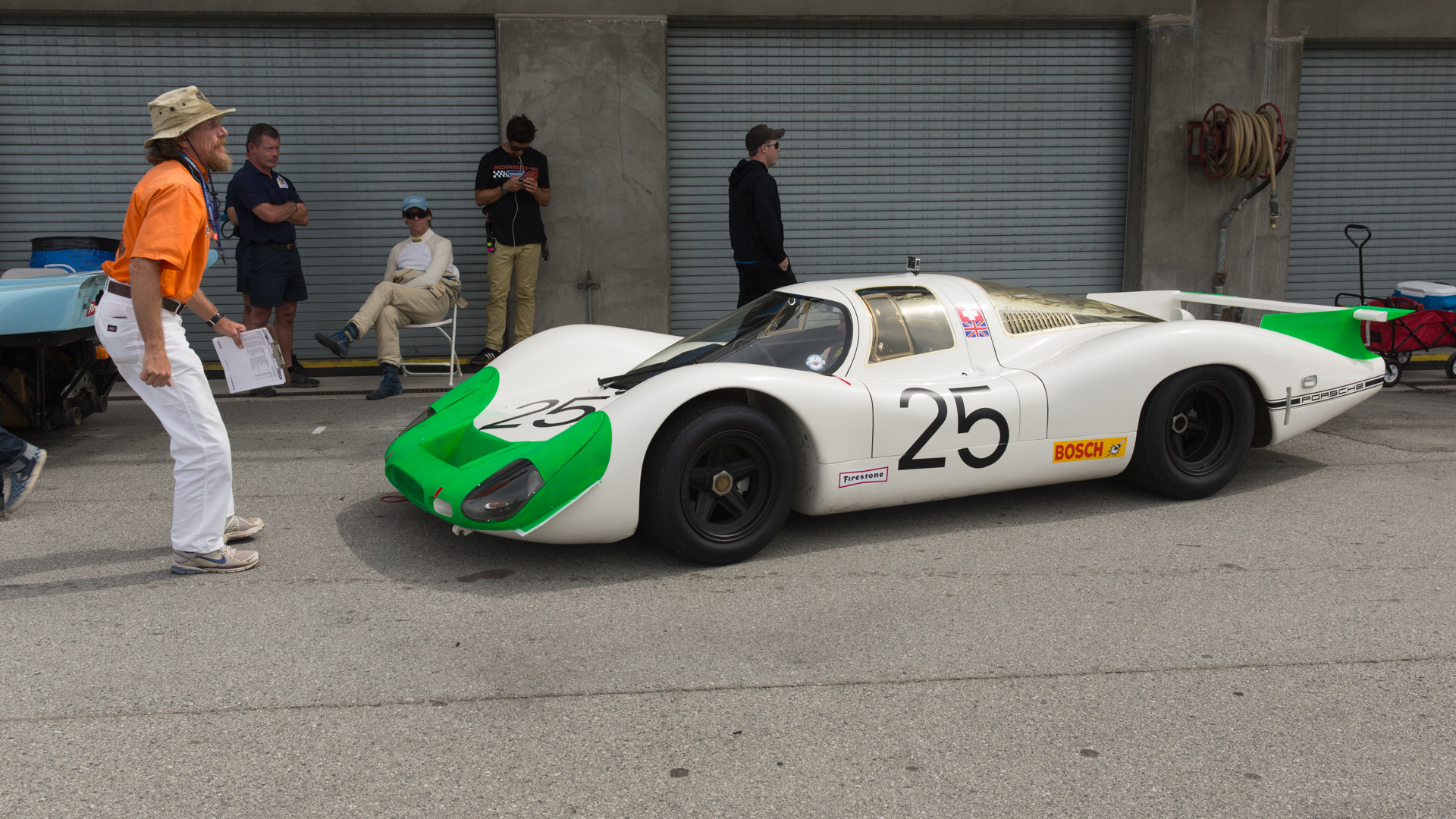 Porsche 908 LH at Rennsport Reunion V